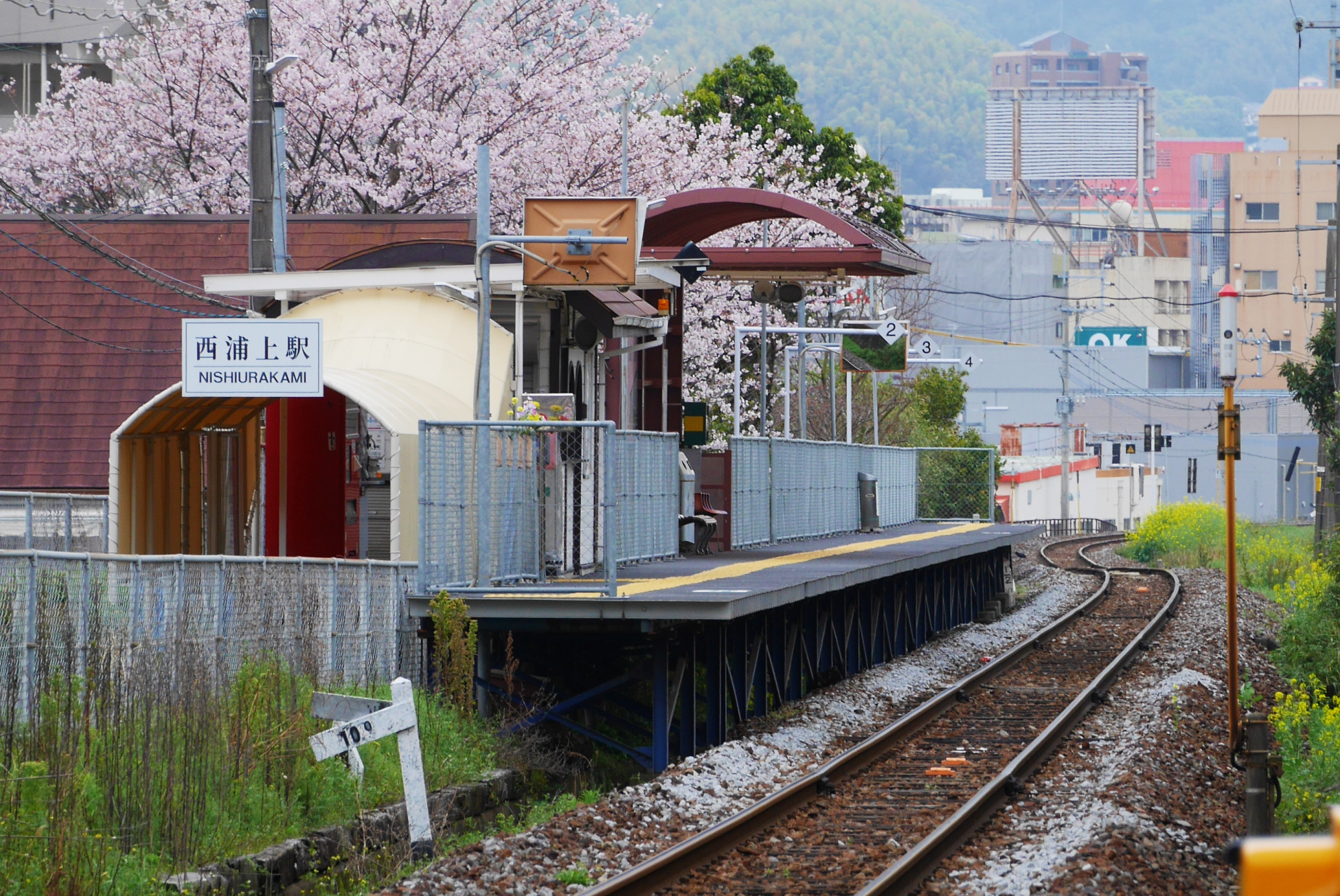 JR九州・長崎本線の西浦上駅（長崎県長崎市）